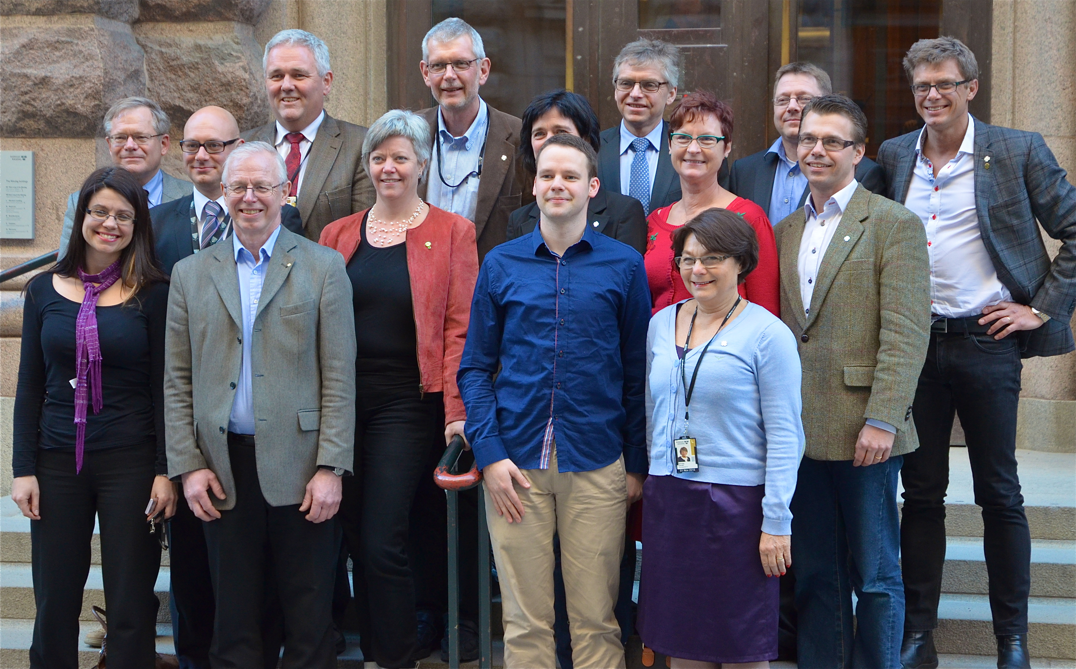 Några av Centerpartiets RD-ledamöter utanför Sveriges Riksdag 13 mars 2012.